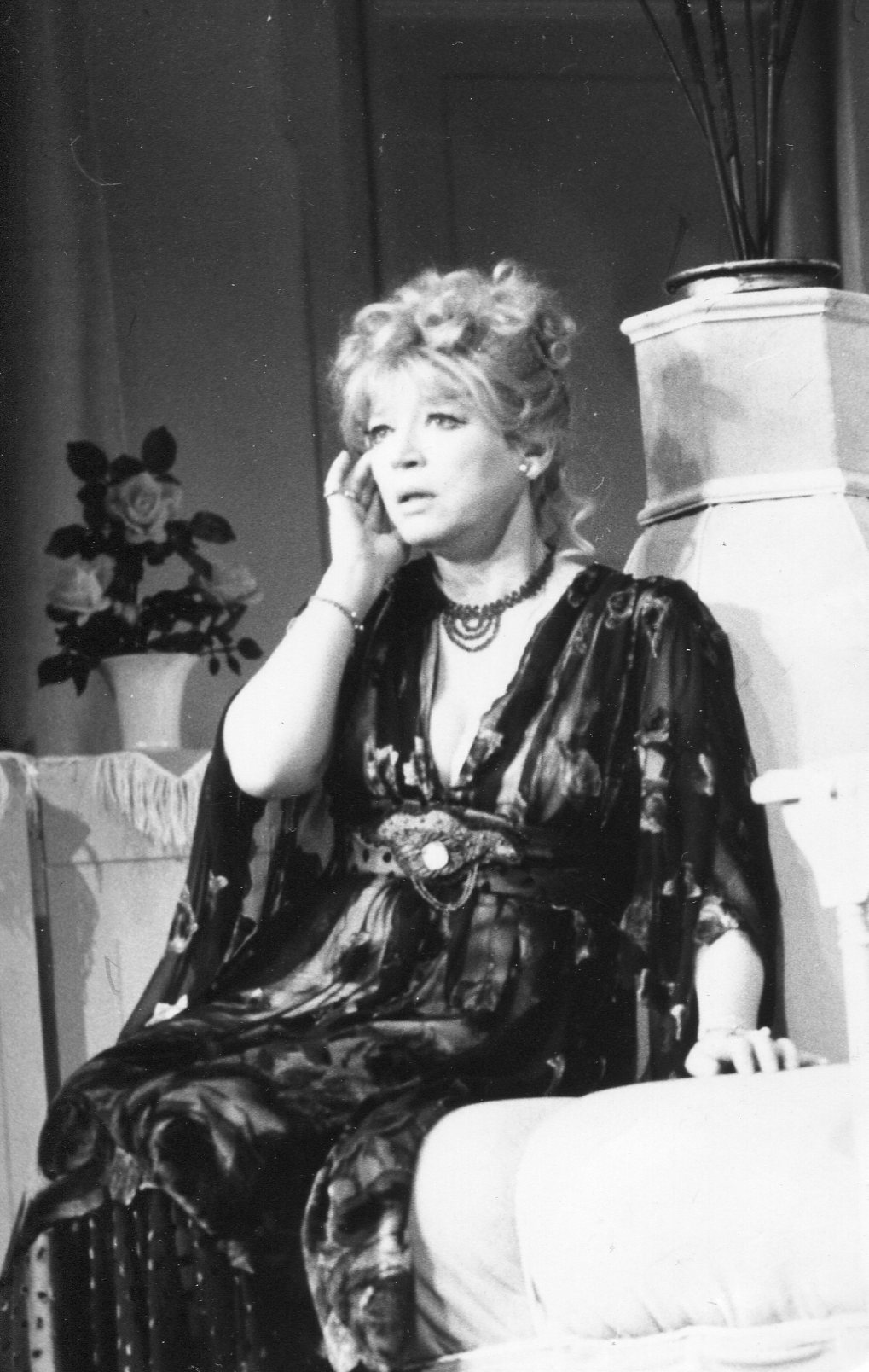 Demjén Gyöngyvér mint Sárkányné. Molnár Ferenc: Doktor úr.